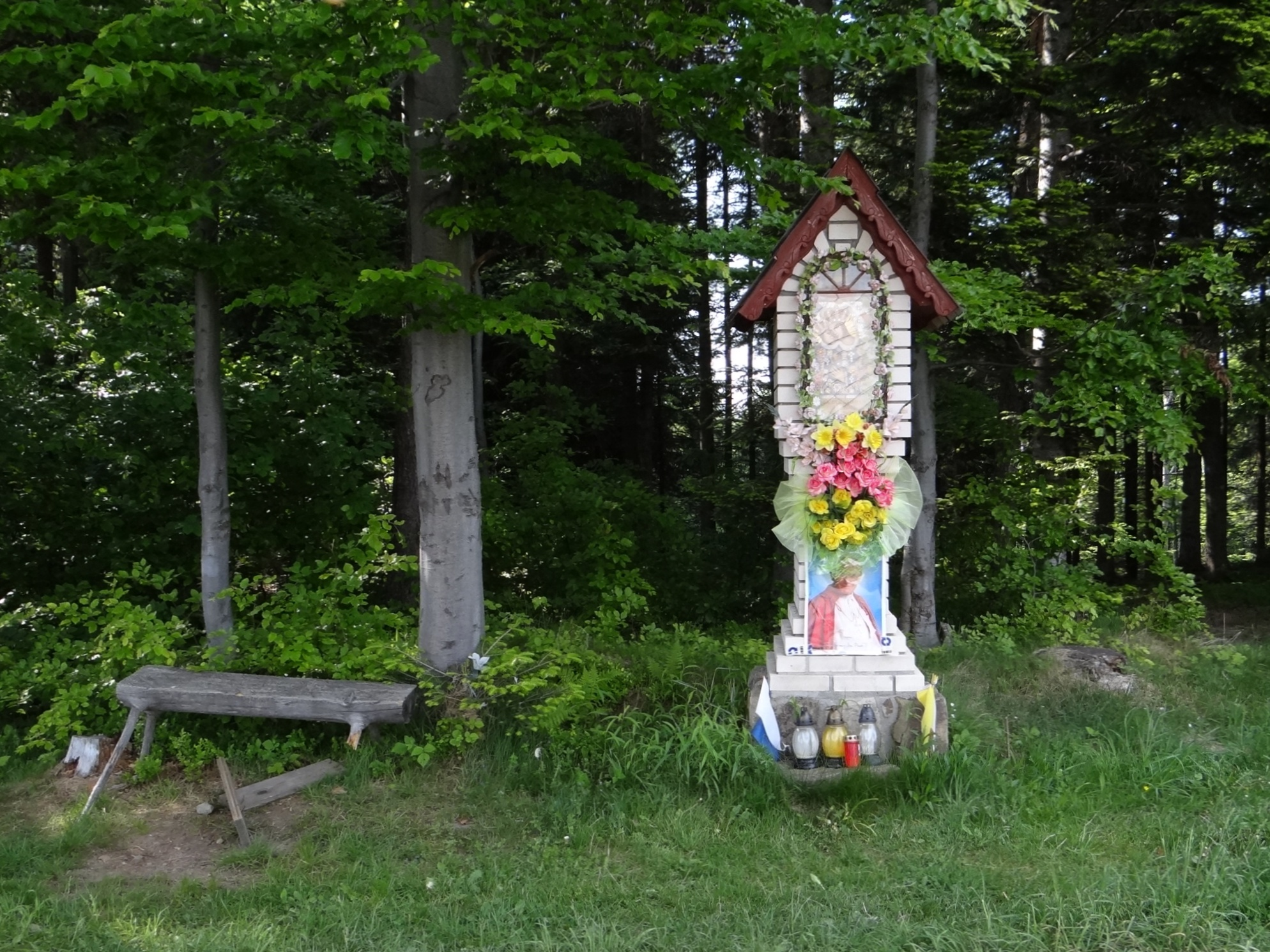 Kapliczka na przełęczy Kolędówki w Paśmie Przedbabiogórskim miejscowość Zawoja)